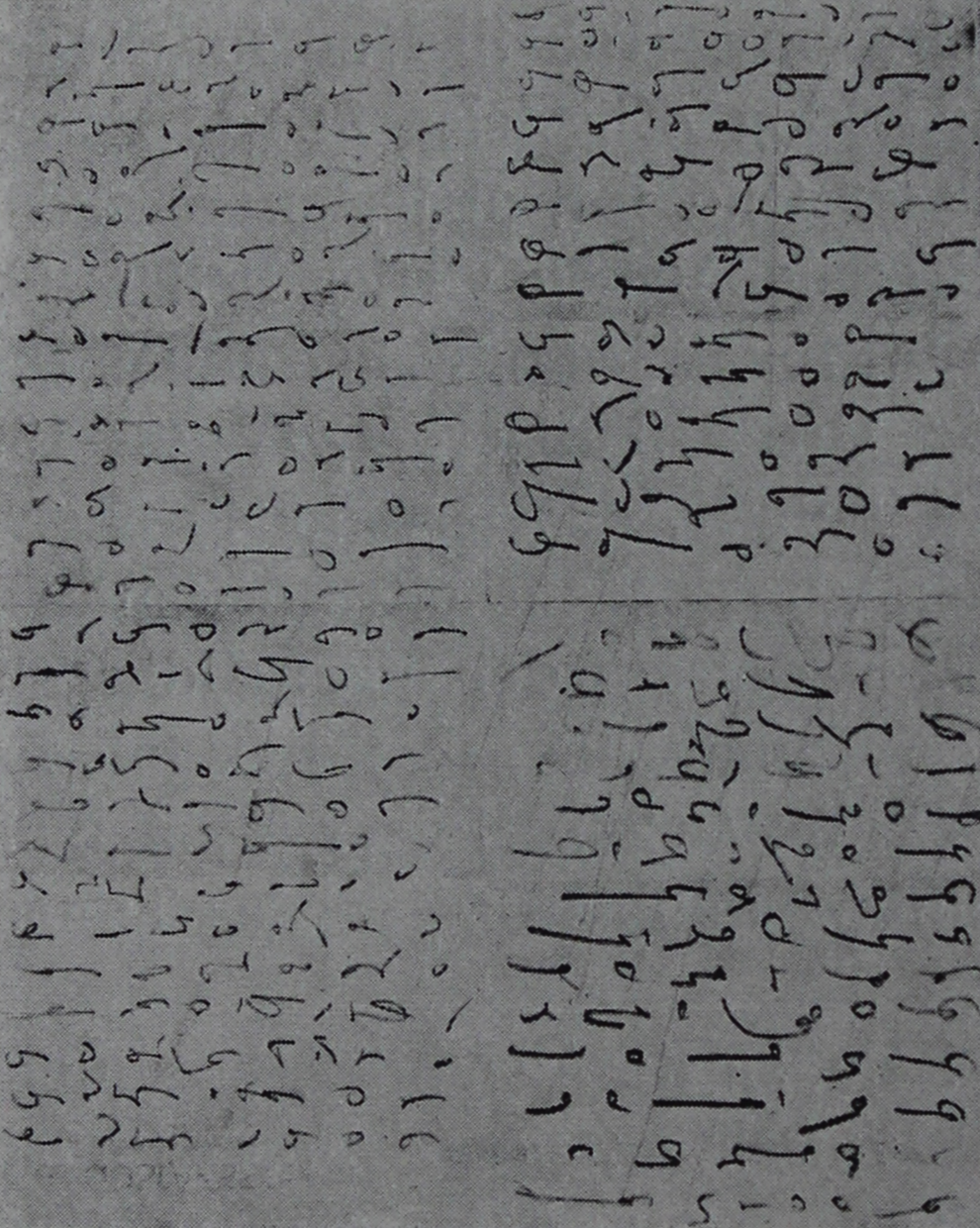 Tungetale nedskrevet af en pintsevakt Mand. Illustration til Carl Julius Salomonsen (1920) "Dysmorphismens sygelige Natur".